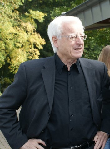 Dieter Dollmann 2011